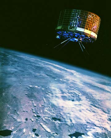 TIROS 8 PAYLOAD